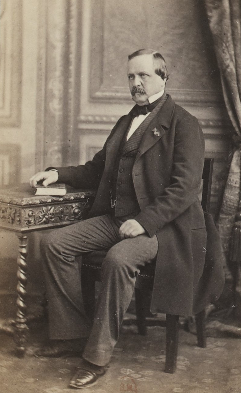 Album des députés au Corps législatif entre 1852-1857.